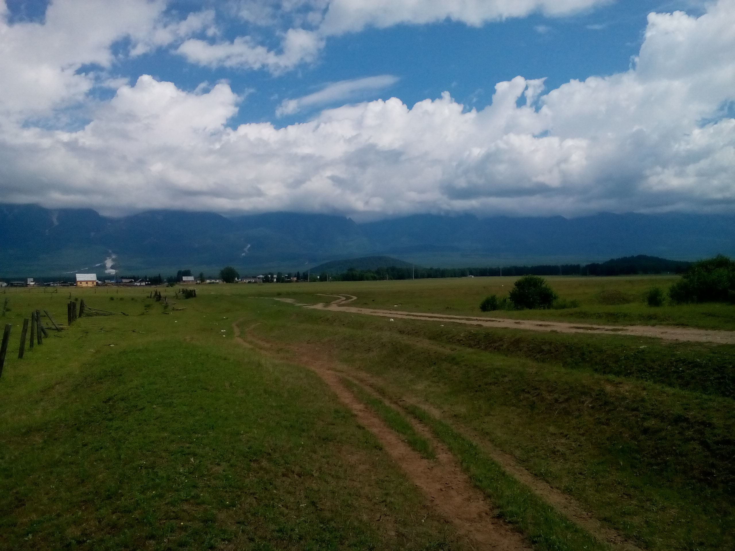 Потухшие вулканы Тункинской впадины. По центру — Черского (Хара-Болдок), холм справа — Шунугун.